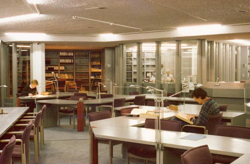 Bundesarchiv in Koblenz Lesesaal